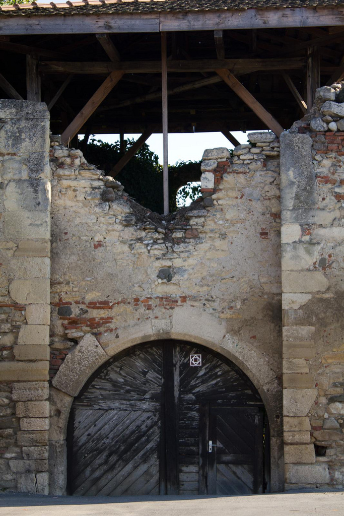 Ziddeincintă, cu turn de poartă, biserica reformată, sat Șard; comuna Ighiu, judeţul Alba. Datare: sec. XV - XVIII. 02